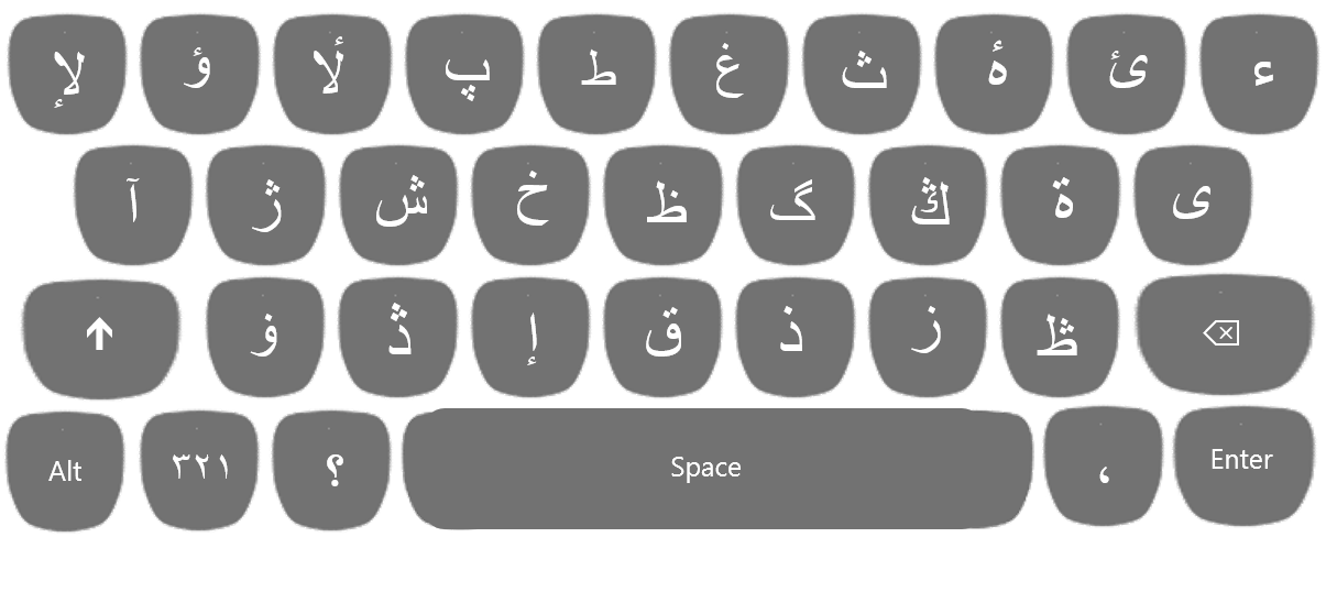 Susunatur papan kekunci aksara Jawi posisi peralihan mengikut susunan ergonomik